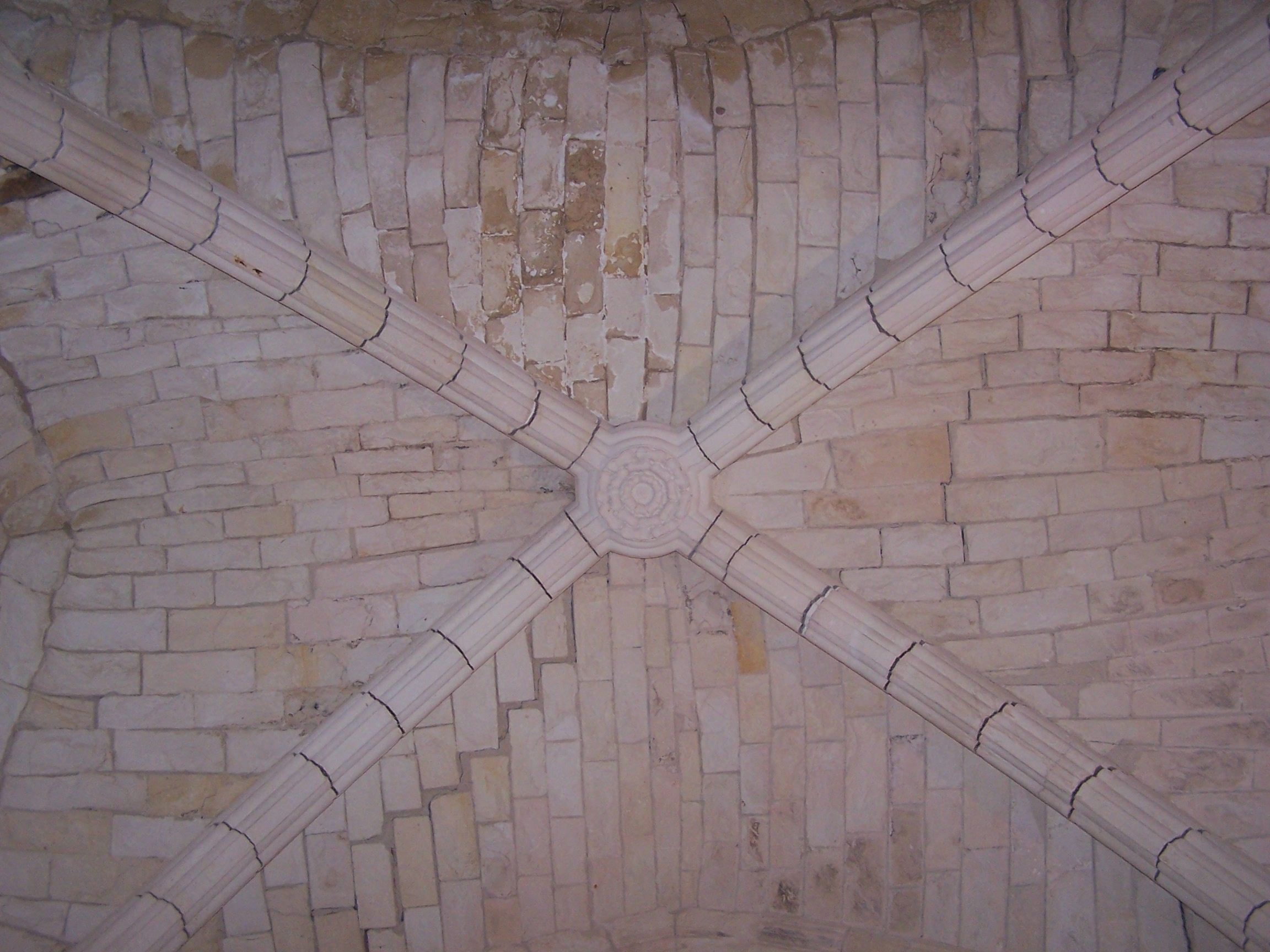 Photographie de la voûte sur croisée d'ogives de la salle de la vigie basse de la tour Saint-Nicolas (XIVe - XVe siècle) du Vieux-Port de La Rochelle.